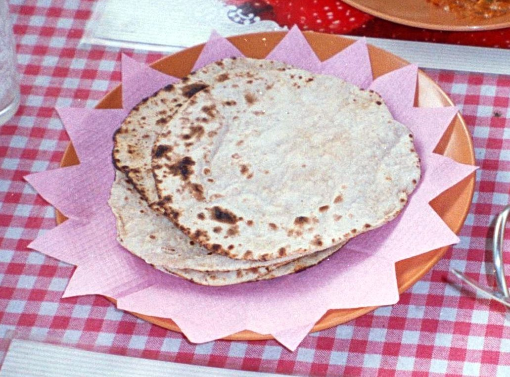 Chapati / Roti / Indisches Fladenbrot